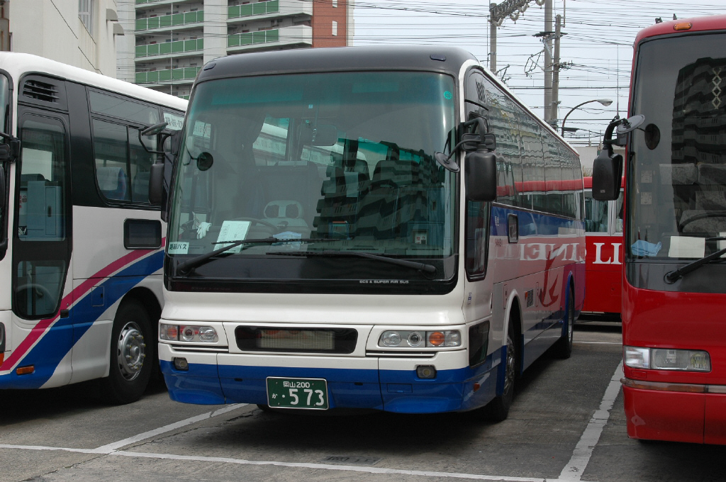 ジェイアール九州バス博多支店にて、許可を得て撮影